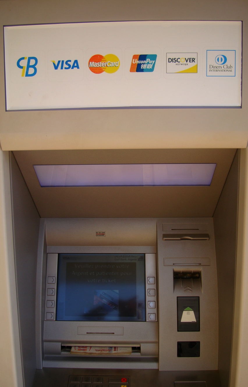 GAB de la banque AGB à Chlef